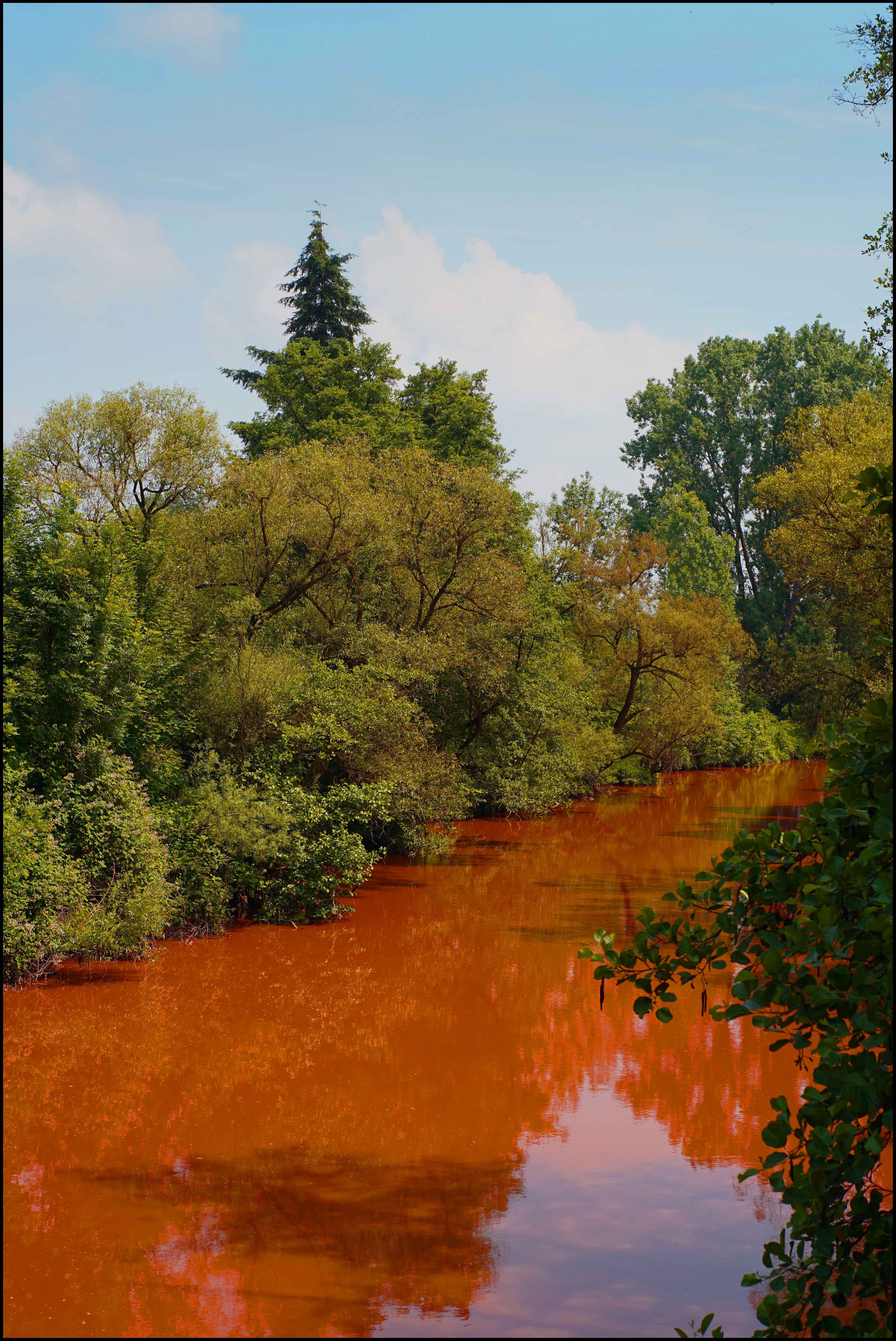 Die Prims bei Diefflen durch Buntsandsteinerosion nach heftigen Regenfällen rotgefärbt, 9. Juni 2018, gegen 13 Uhr